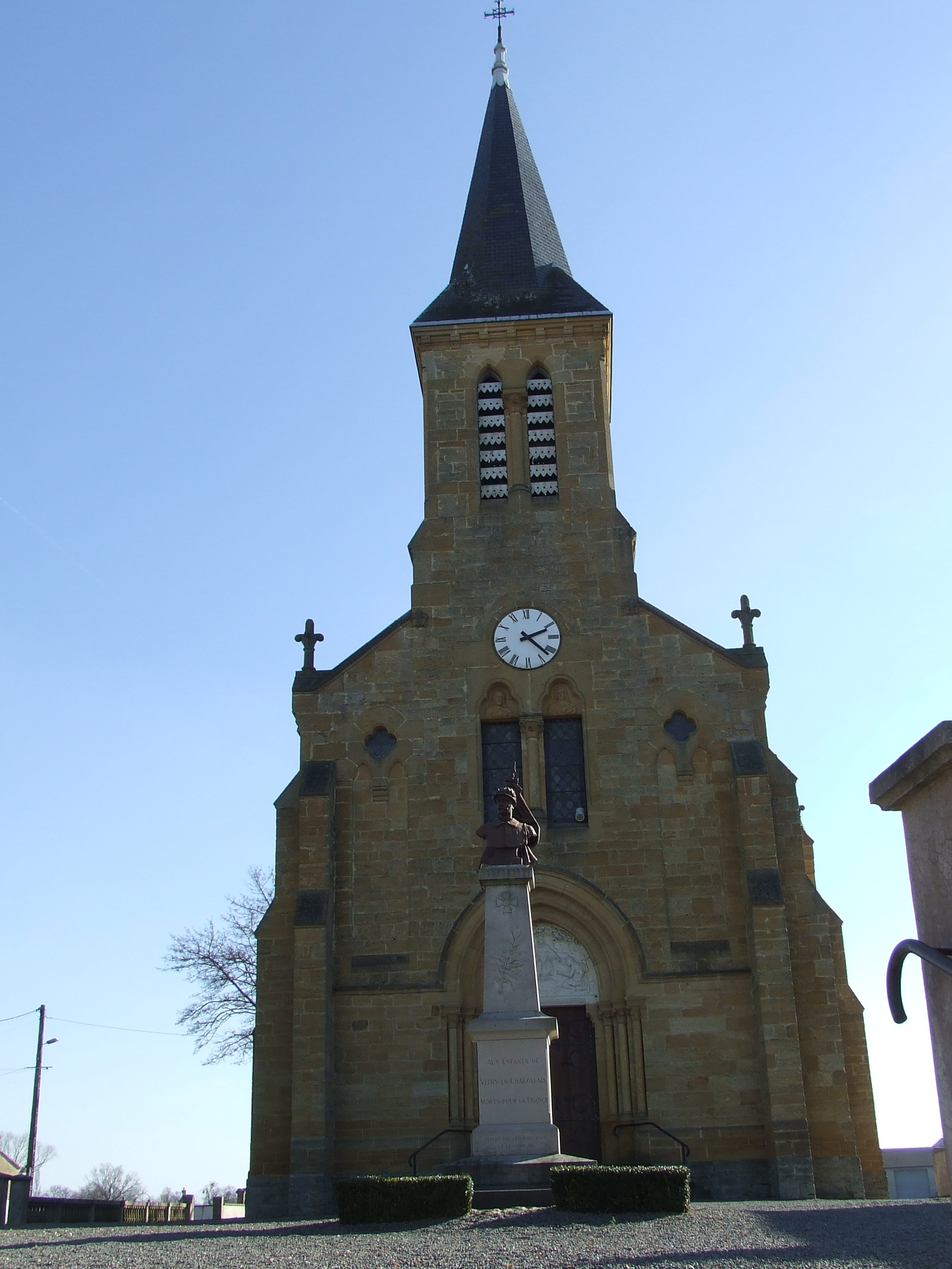 Eglise de Vitry en charollais